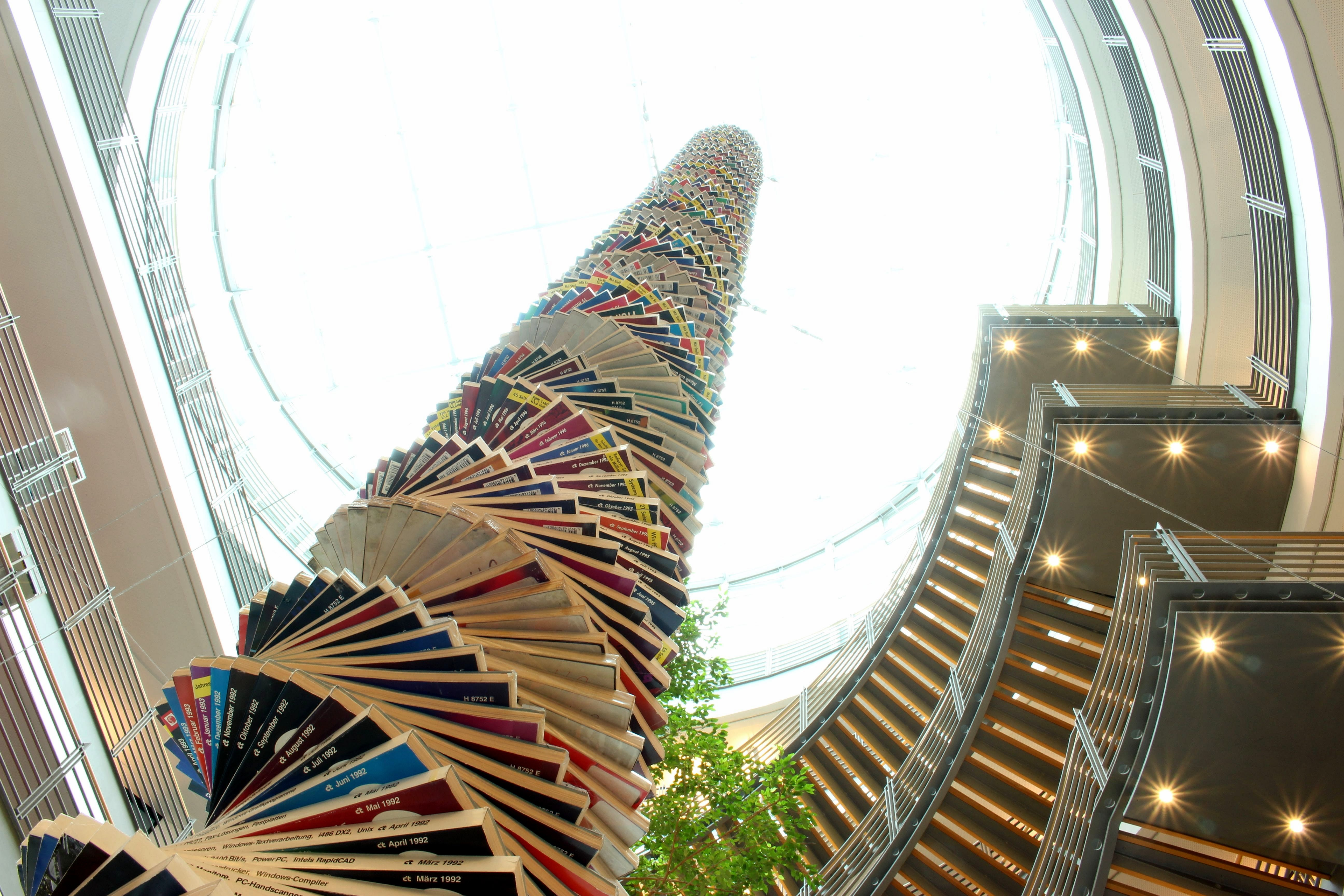 30 Jahre c't